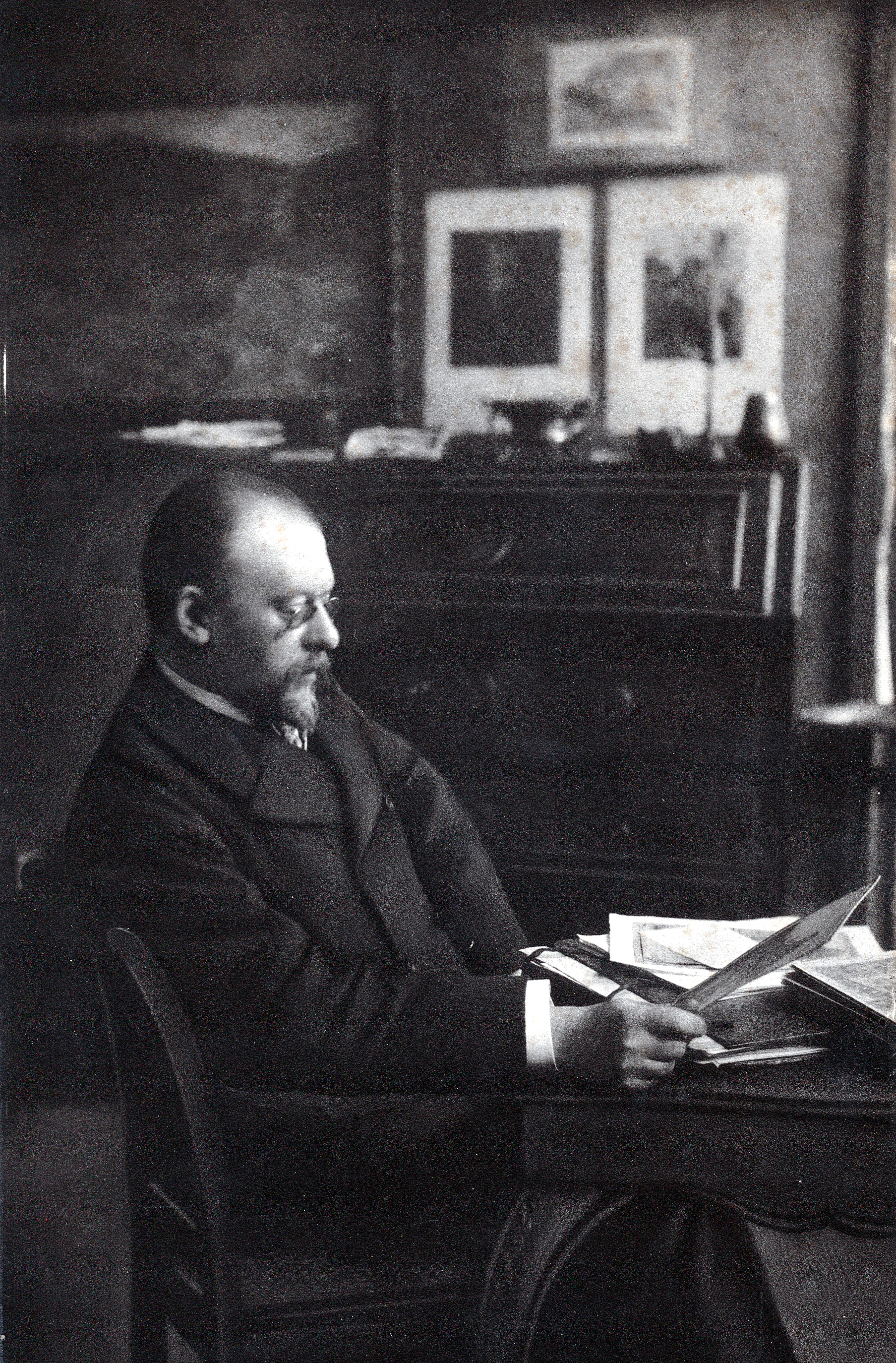 Armand Heins in zijn atelier in de Onderstraat Gent, gefotografeerd door Edmond Sacré.